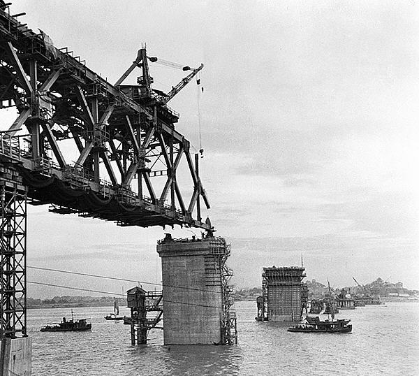 建设中的武汉长江大桥